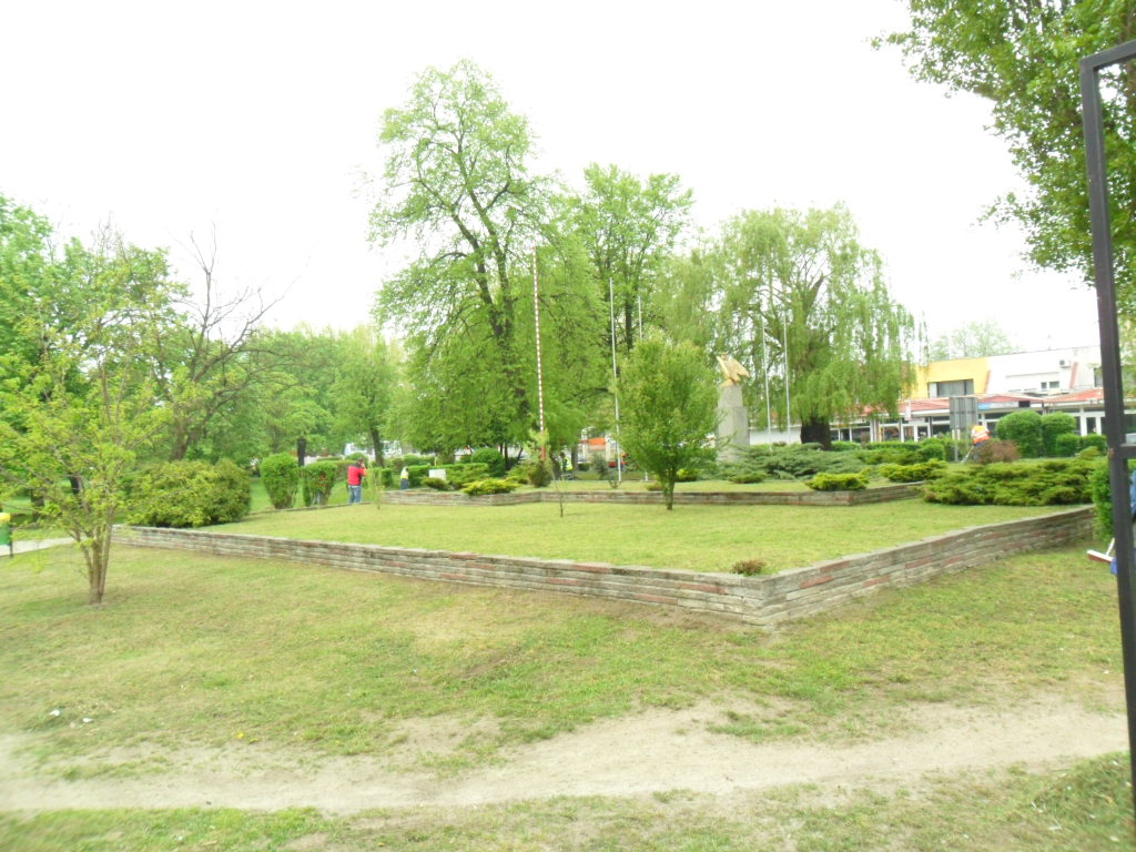 Gubin, Park Wolności